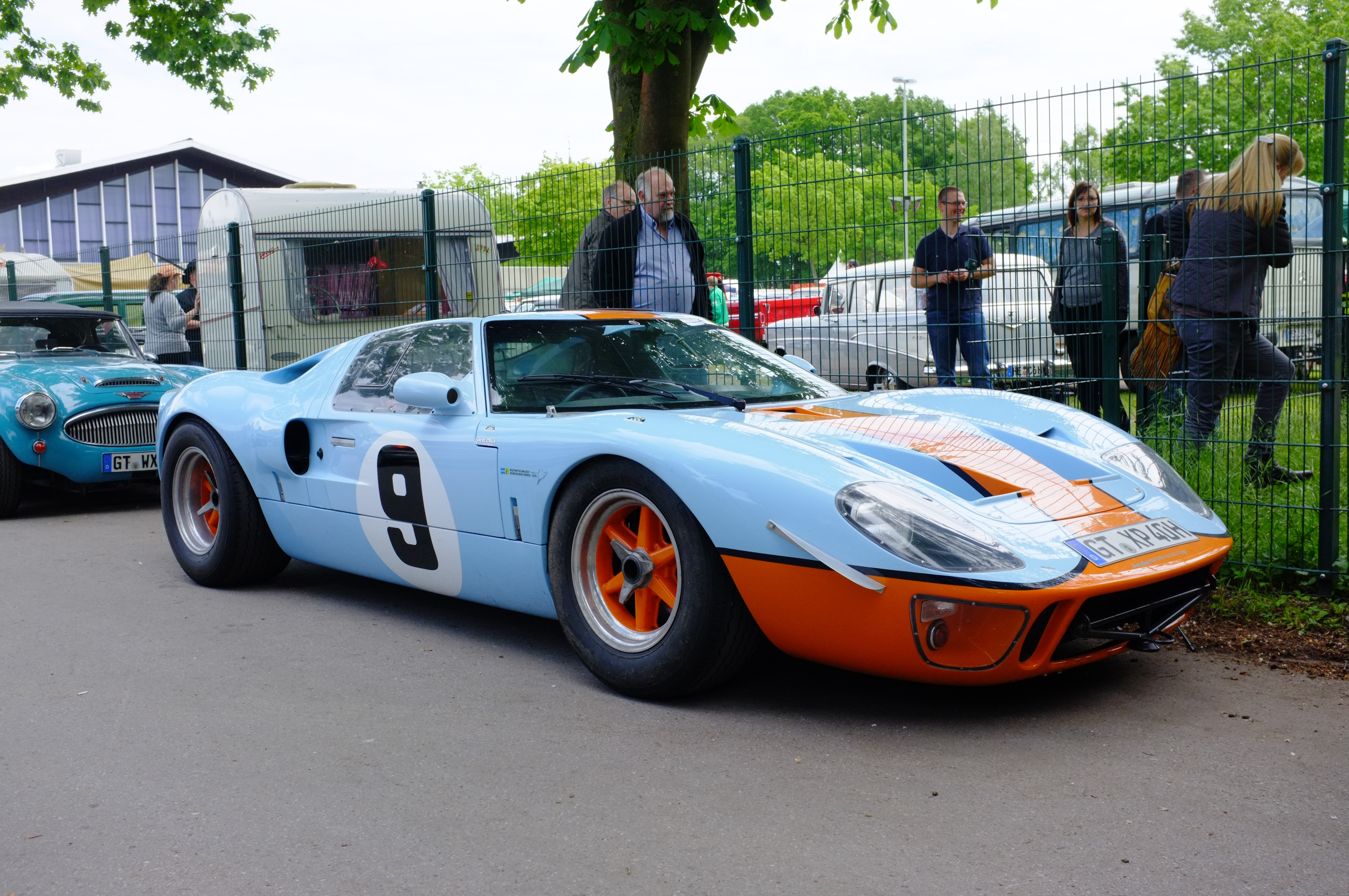 Straßenkreuzer Treffen, Kaunitz 2015